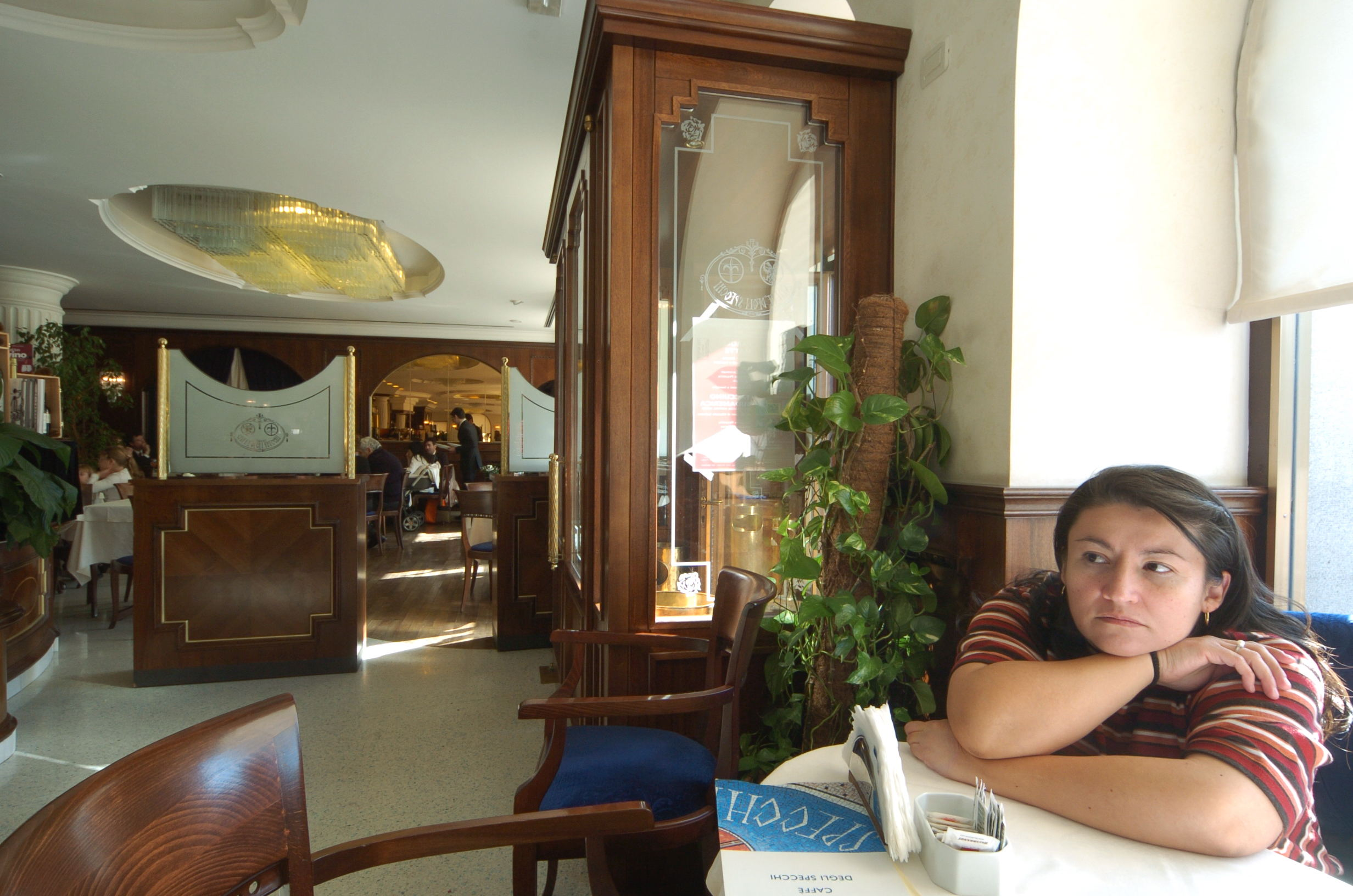 Cafe degli Specchi in Trieste, Italy